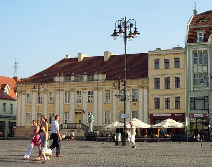 Budynek przy Starym Rynku wzniesiony w l. 1775-78 dla Deputacji Kamery Wojenno-Domenalnej na Obwód Nadnotecki, obecnie mieści Miejską i Wojewódzką Bibliotekę Publiczną